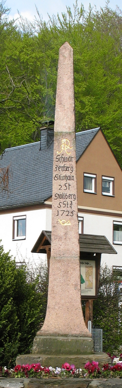 Kurfürstliche Ganzmeilensäule in Crandorf